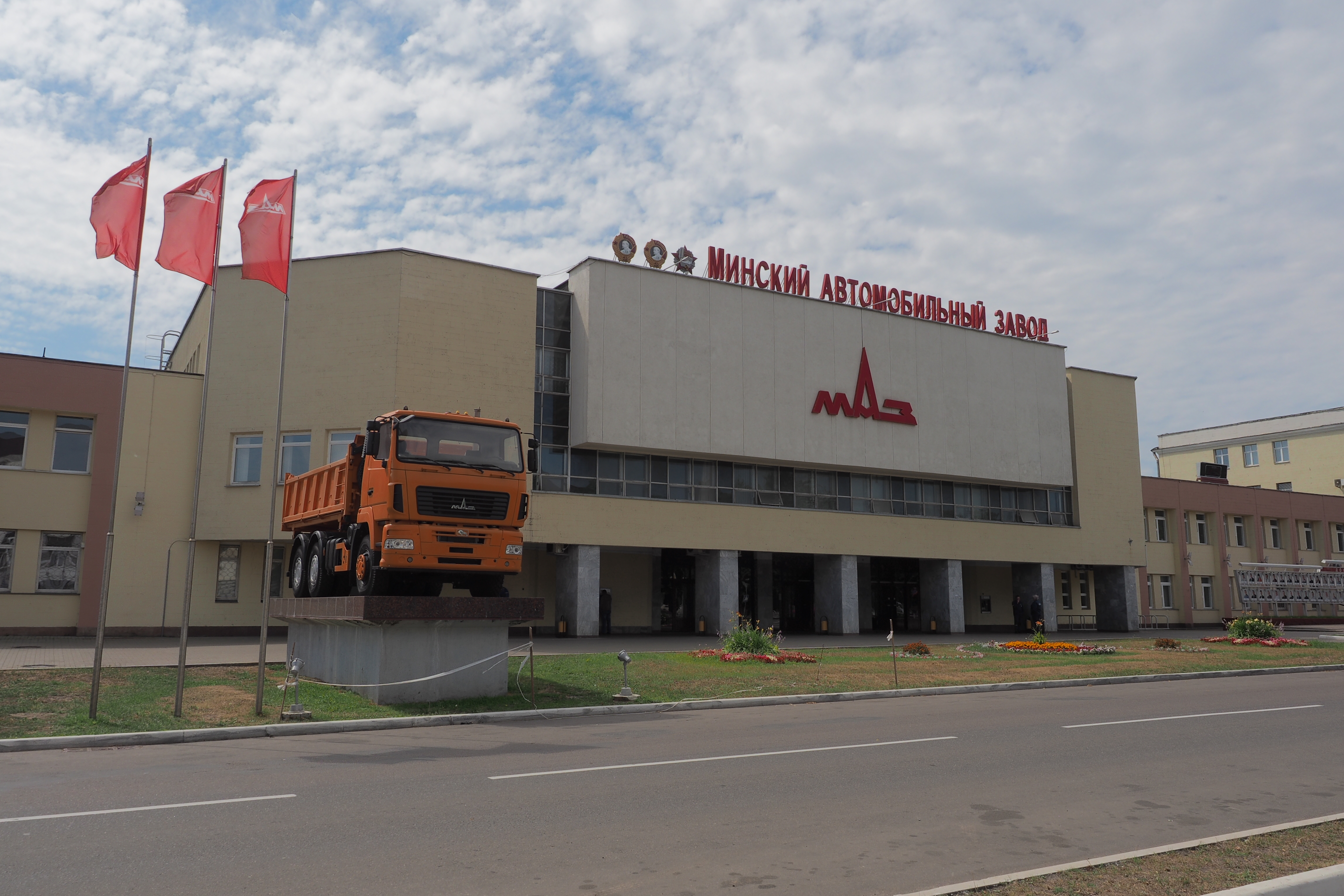 Zavodski Rayon, Minsk, Belarus